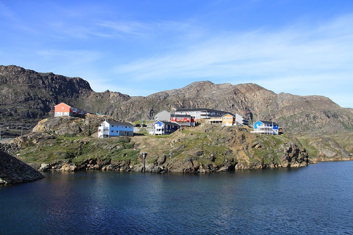 Quartier d'Akia, nord-ouest du centre-bourg de Sisimiut, dans la baie de Kangerluarsunmguaq.